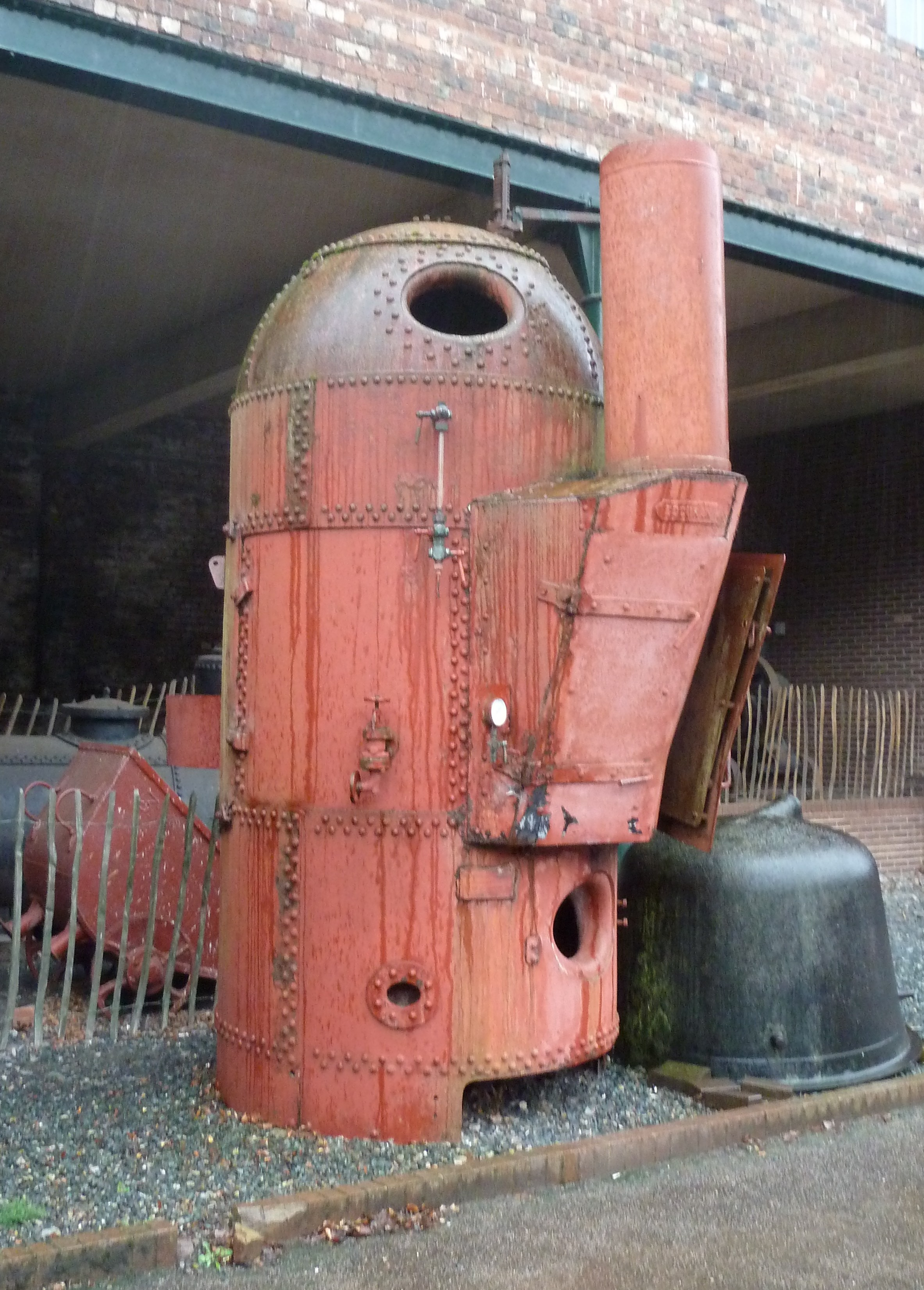 Cochran boiler